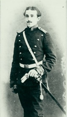 Поручик Христо Топракчиев – извършил разузнавателен полет над Одрин по време на Балканската война. Сливен, 25 август 1907 г.